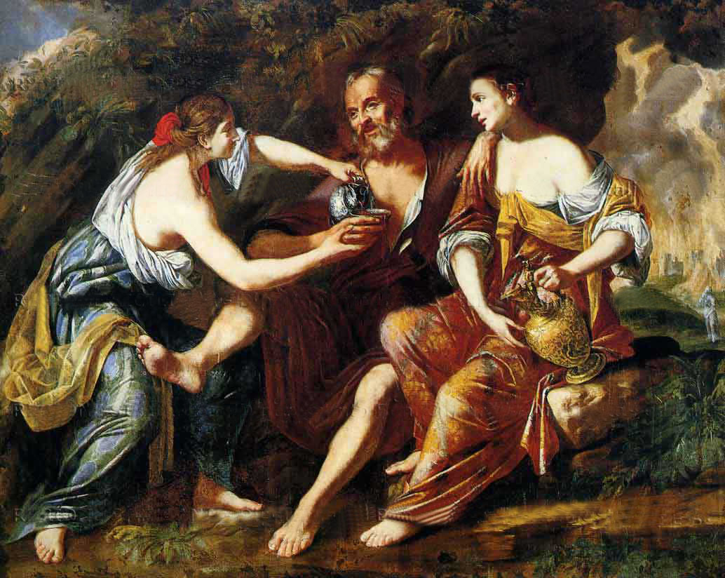 Domenico Marolì, Lot e le figlie, Museo Regionale di Messina.